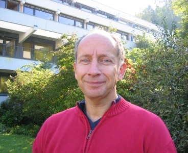 Wolfgang Lück 2006 in Oberwolfach